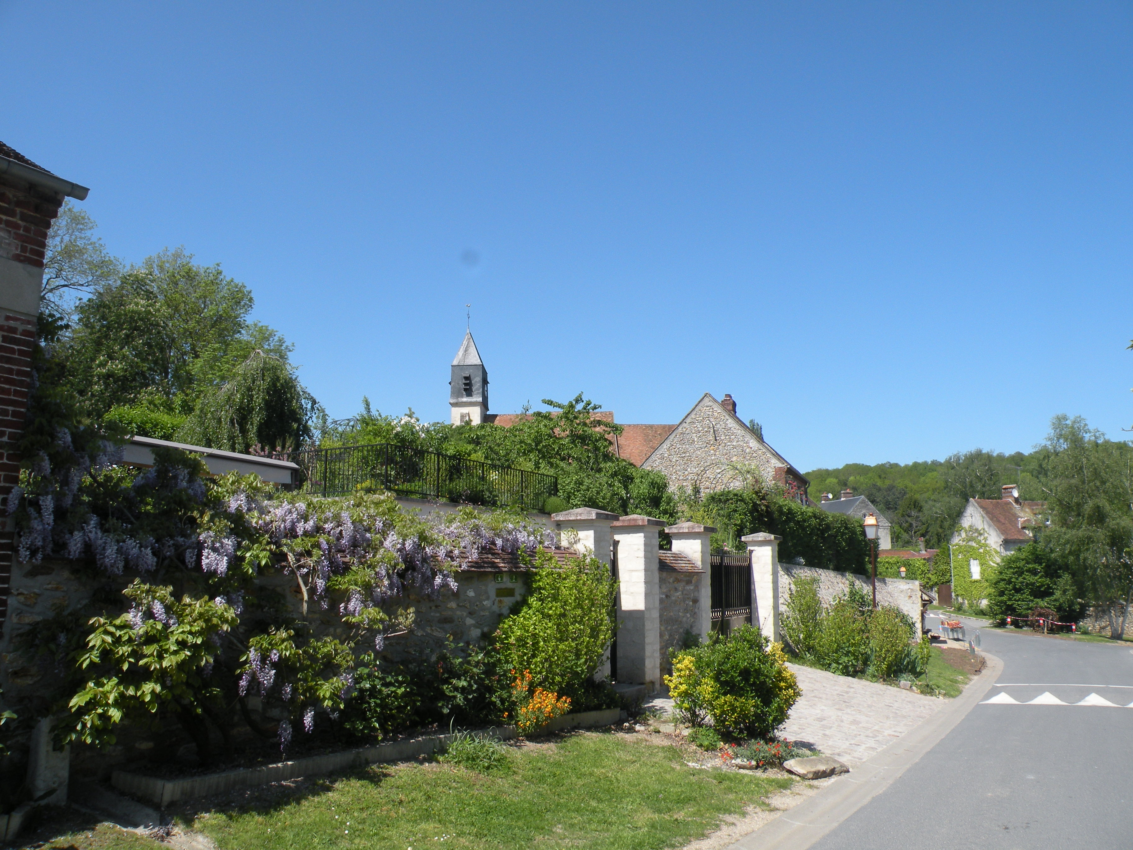 rue de Chavençon